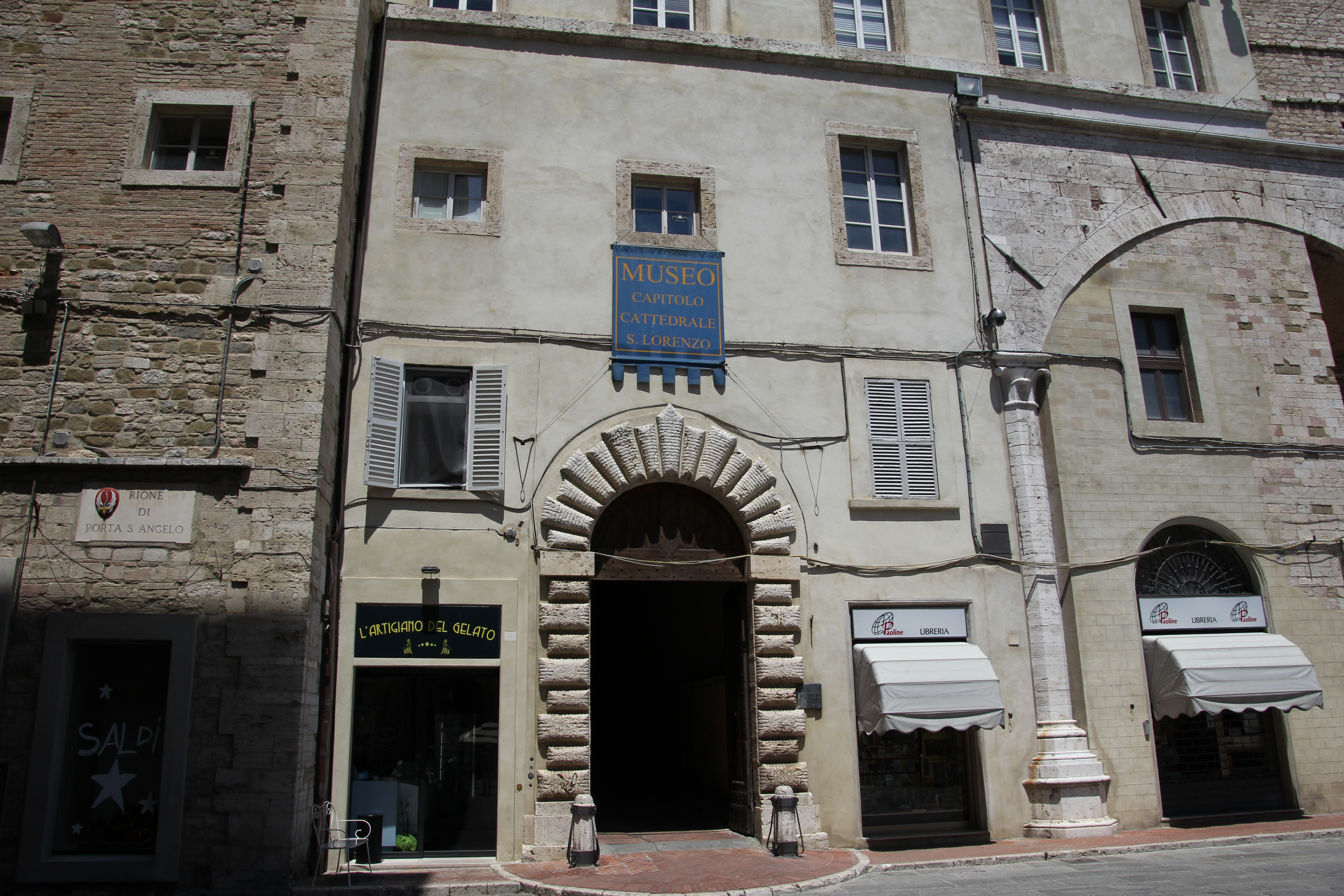 Perugia, Museo del capitolo della cattedrale di San Lorenzo